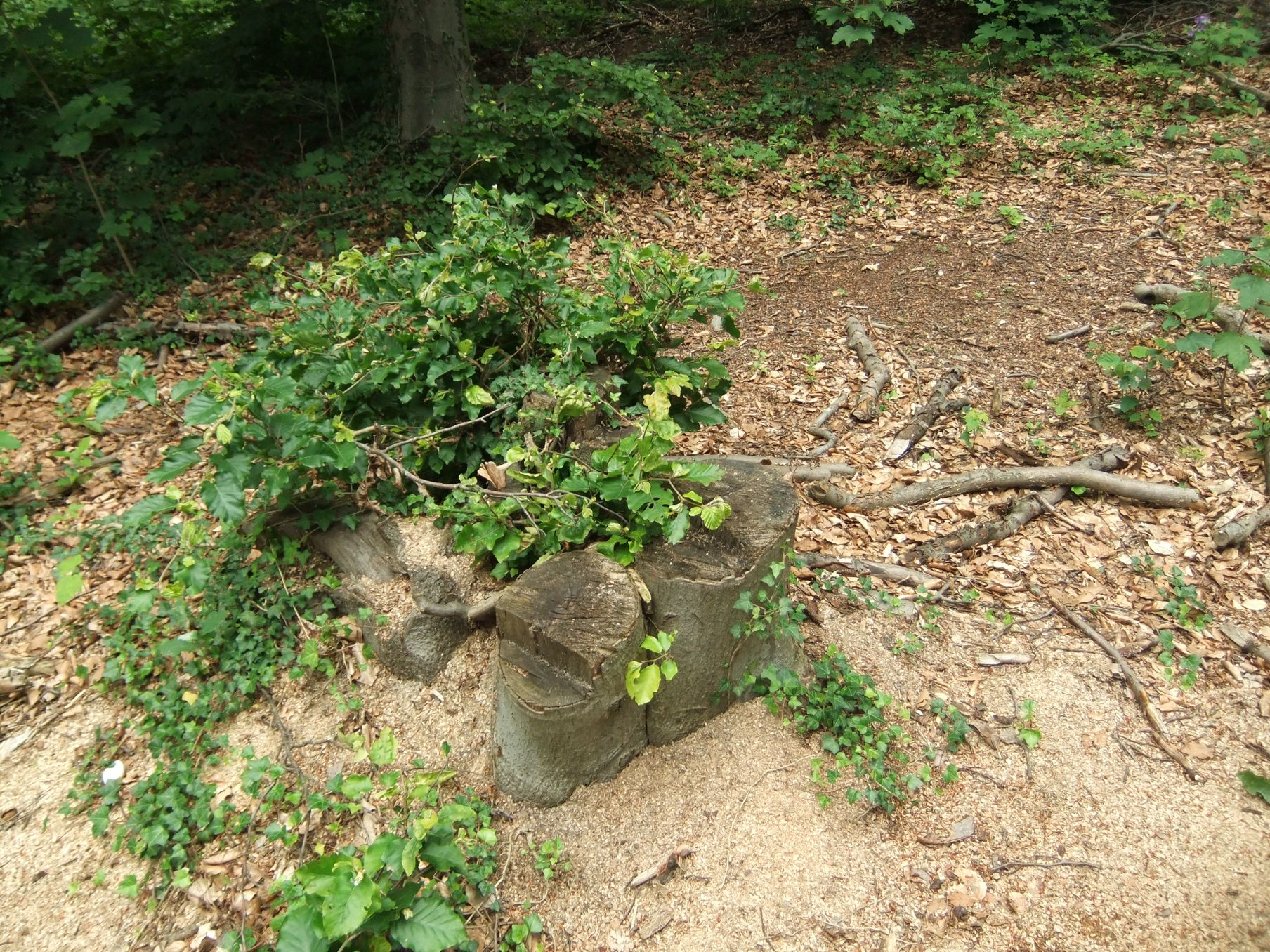 Stockausschlag und Niederwaldbewirtschaftung am Frölenberg im Bielefelder Stadtwald.